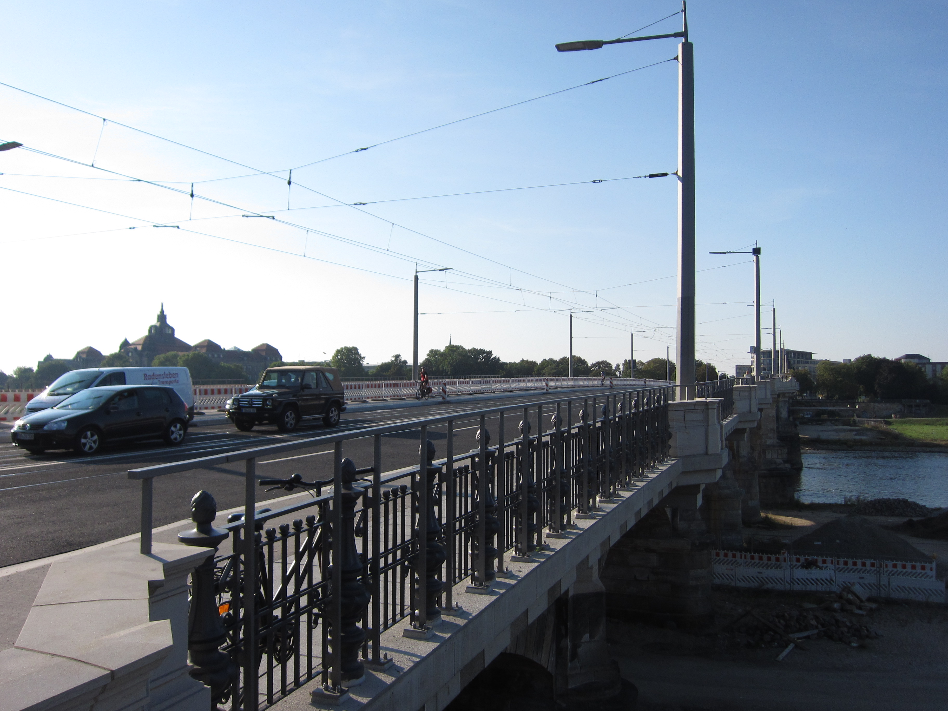 Die Dresdner Albertbrücke in der Woche der Wiedereröffnung nach gut zweijähriger Sanierung